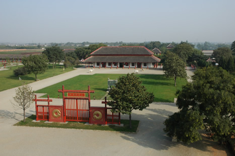 Photograph of Yinxu taken in Anyang, Henan in 2004, September 17.